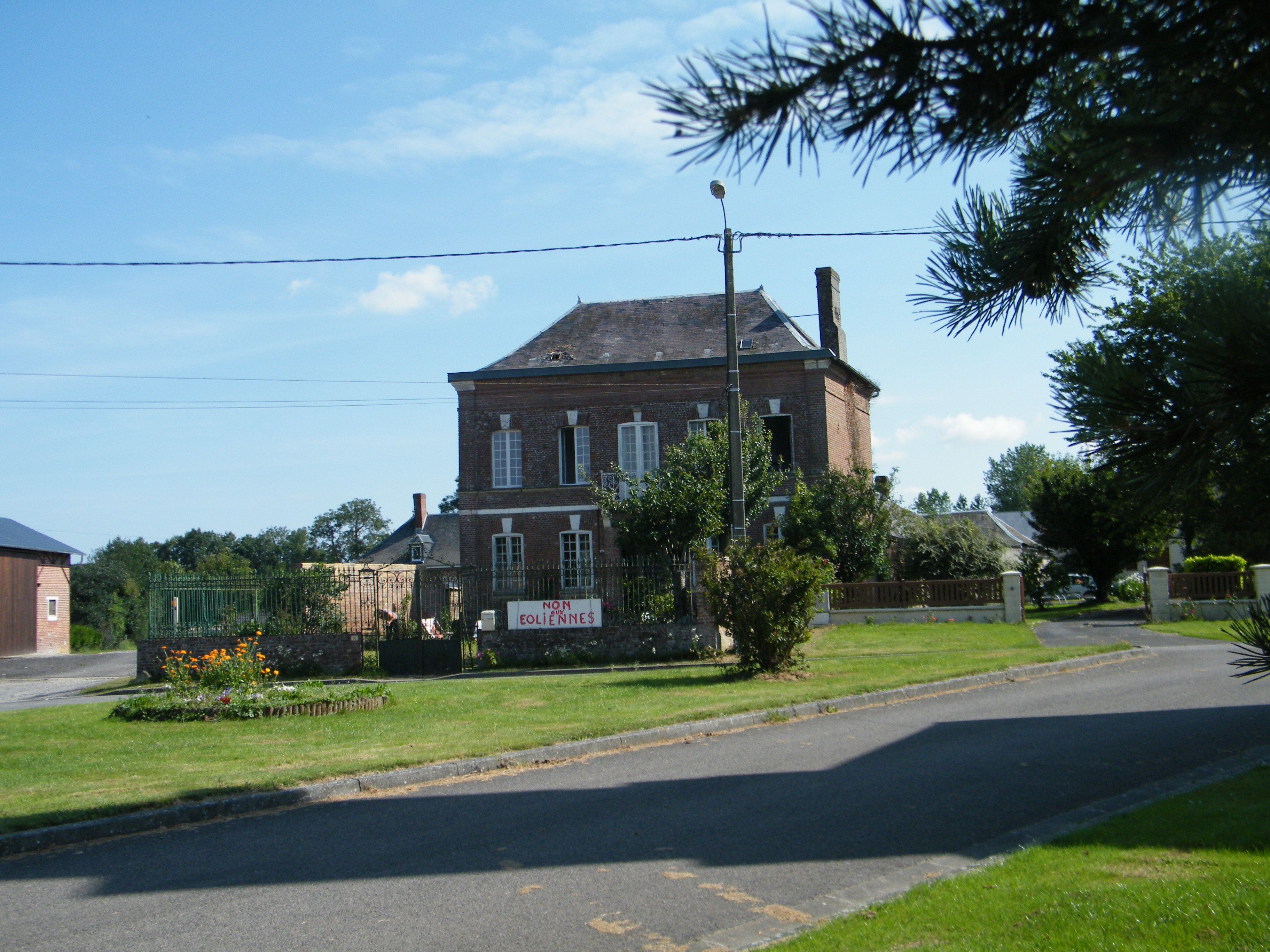 Ancien bâtiment communal.